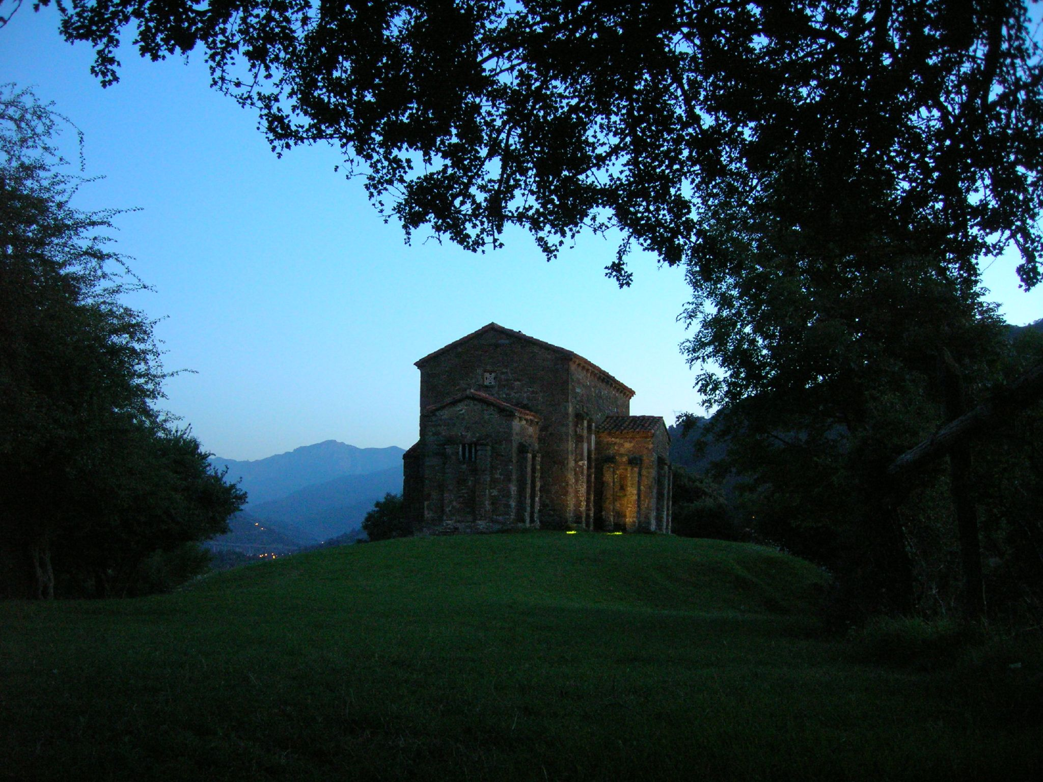 Iglesia de Santa Cristina de Lena, en el concejo asturiano de Lena